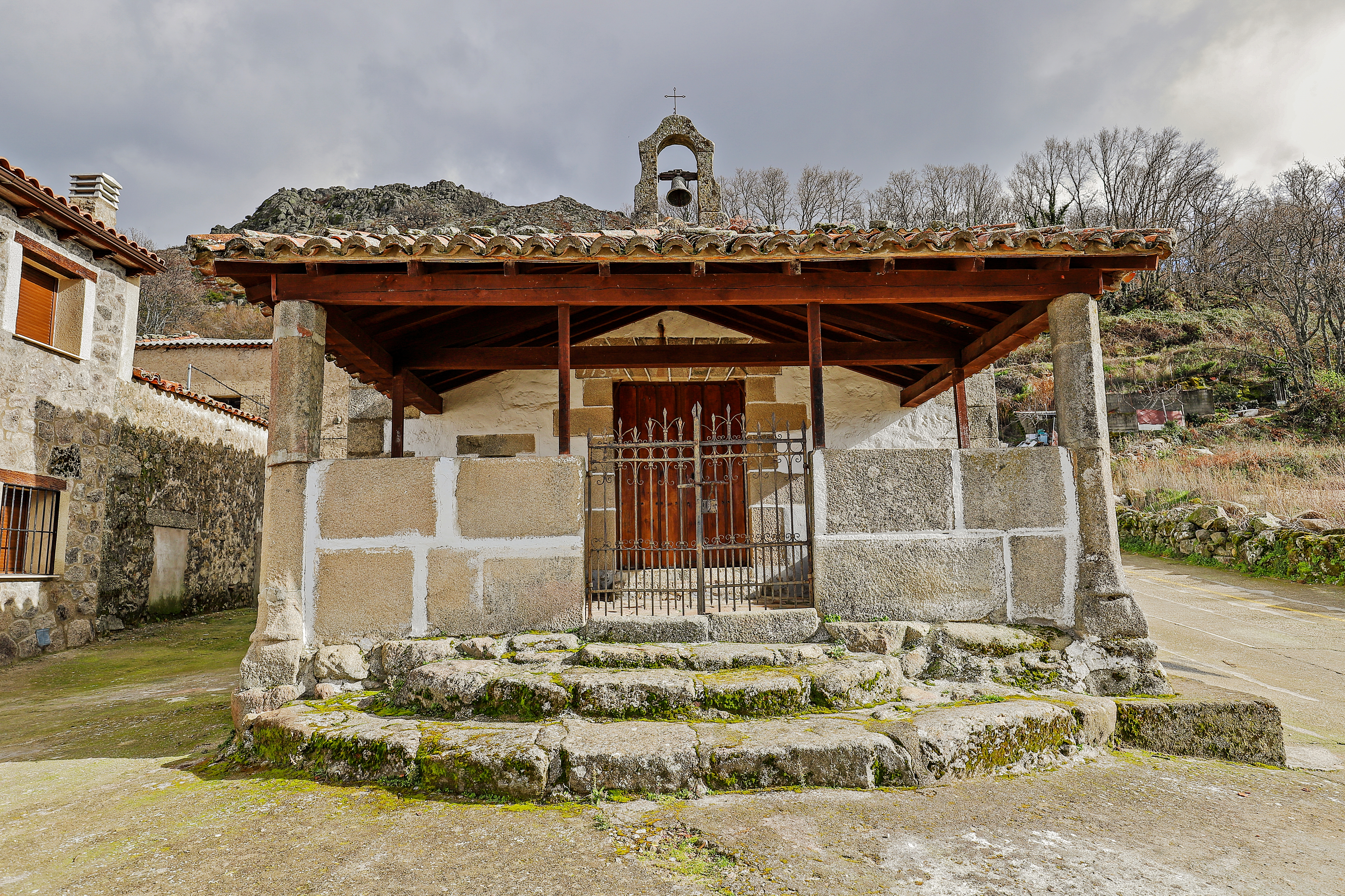 Cabezabellosa es un municipio de la comarca de Trasierra en la provincia de Cáceres.